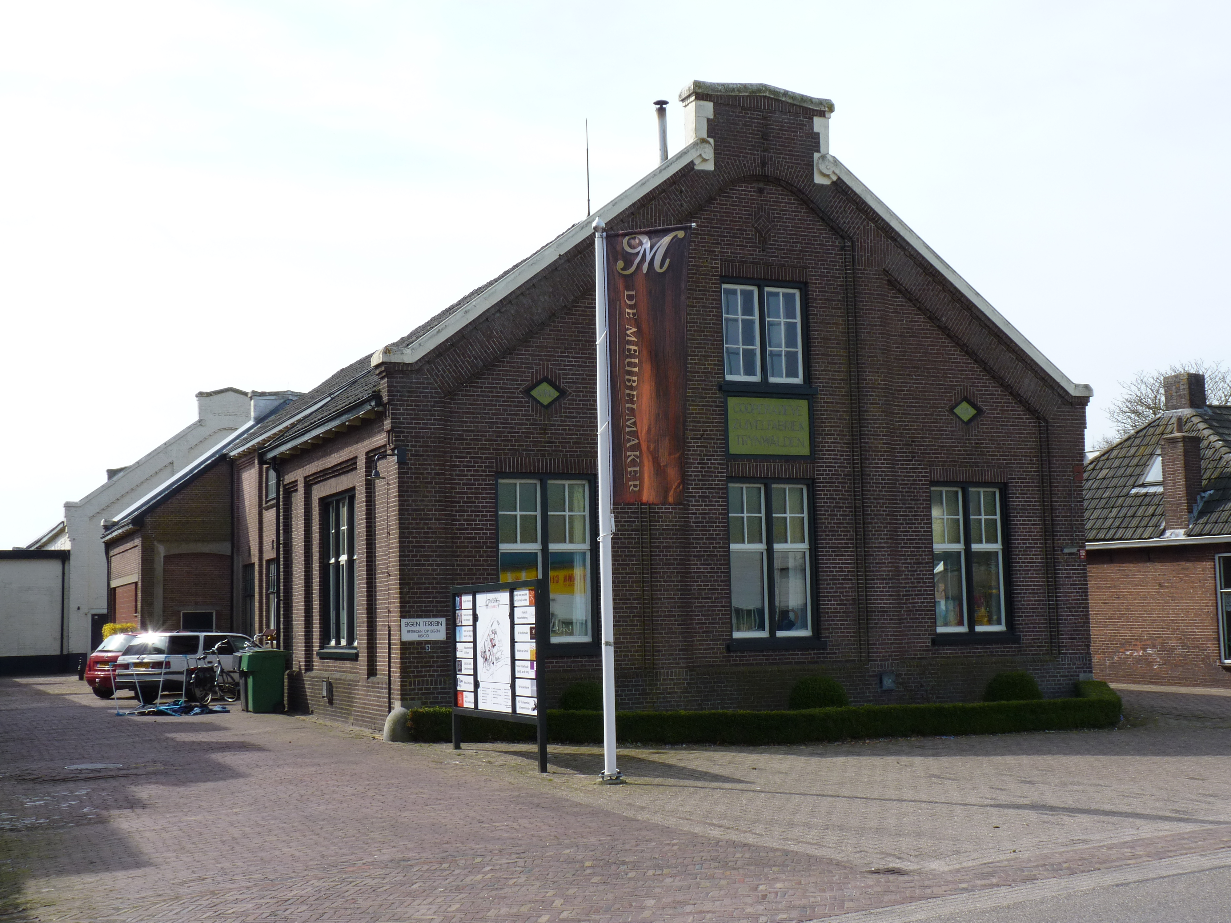 Giekerk Kantoor + lab